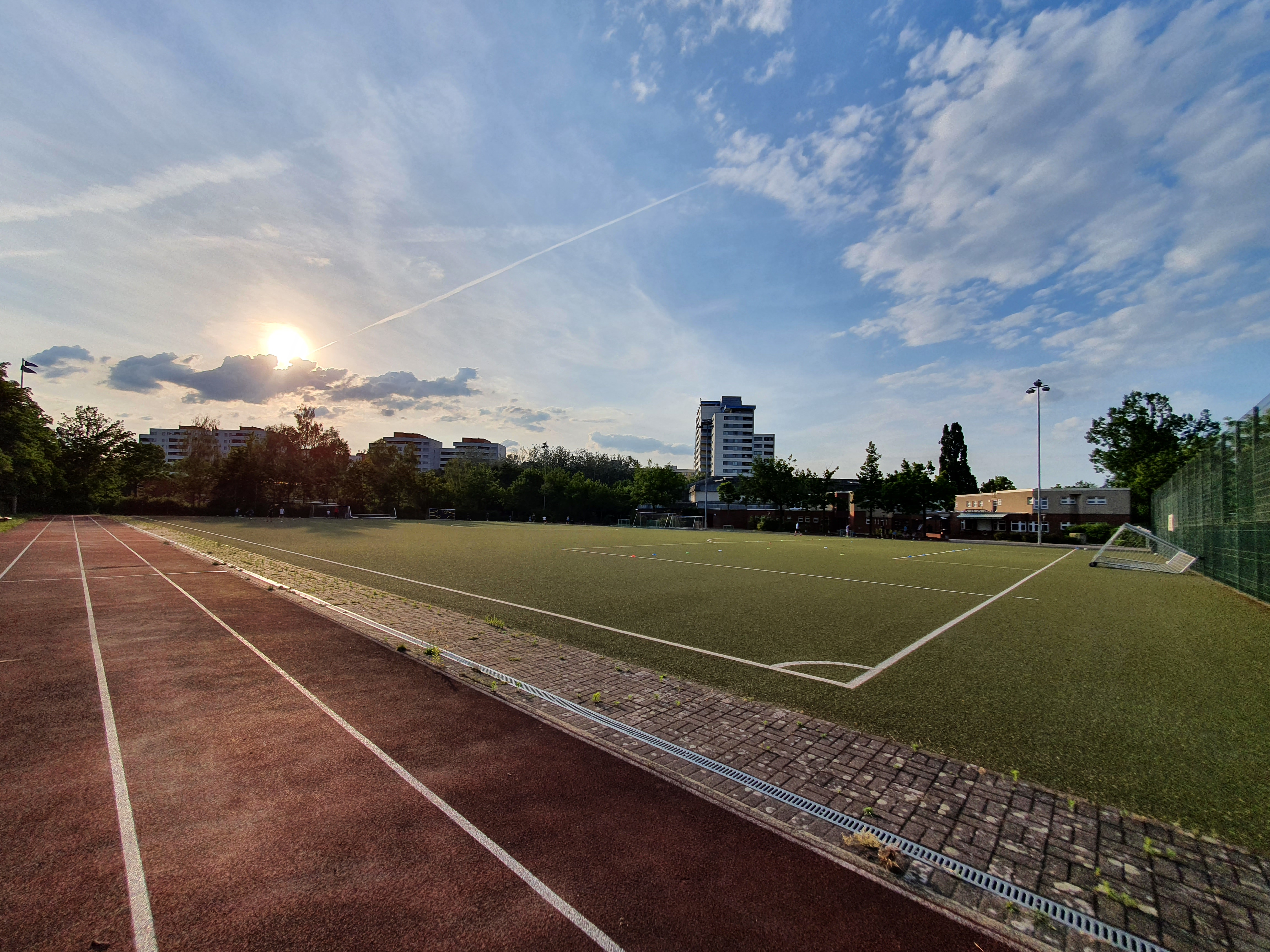 Das Bild zeigt den Fußballplatz der Carl-Schuhmann-Sportanlage in Lichterfelde-Süd (Berlin). Im Hintergrund ist die Thermometersiedlung zu sehen.